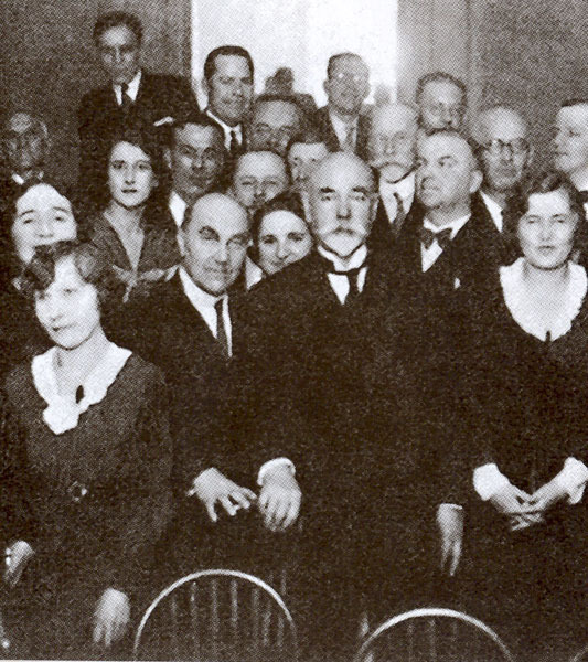 Деникин на встрече русских эмигрантов в Париже, 1930-е гг.